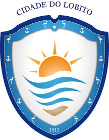 lobito_seal